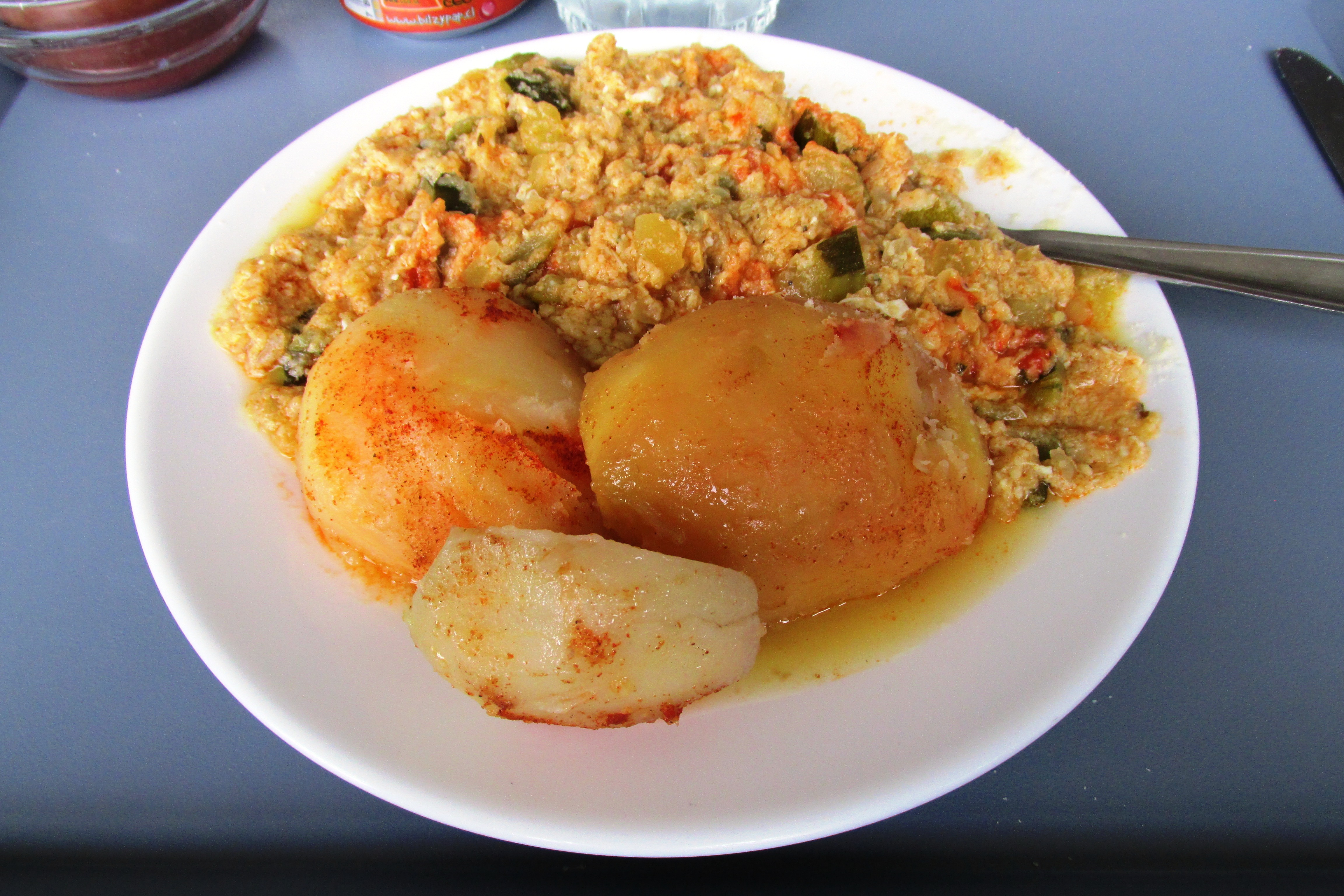 Guiso de zapallo italiano, acompañado de papas doradas